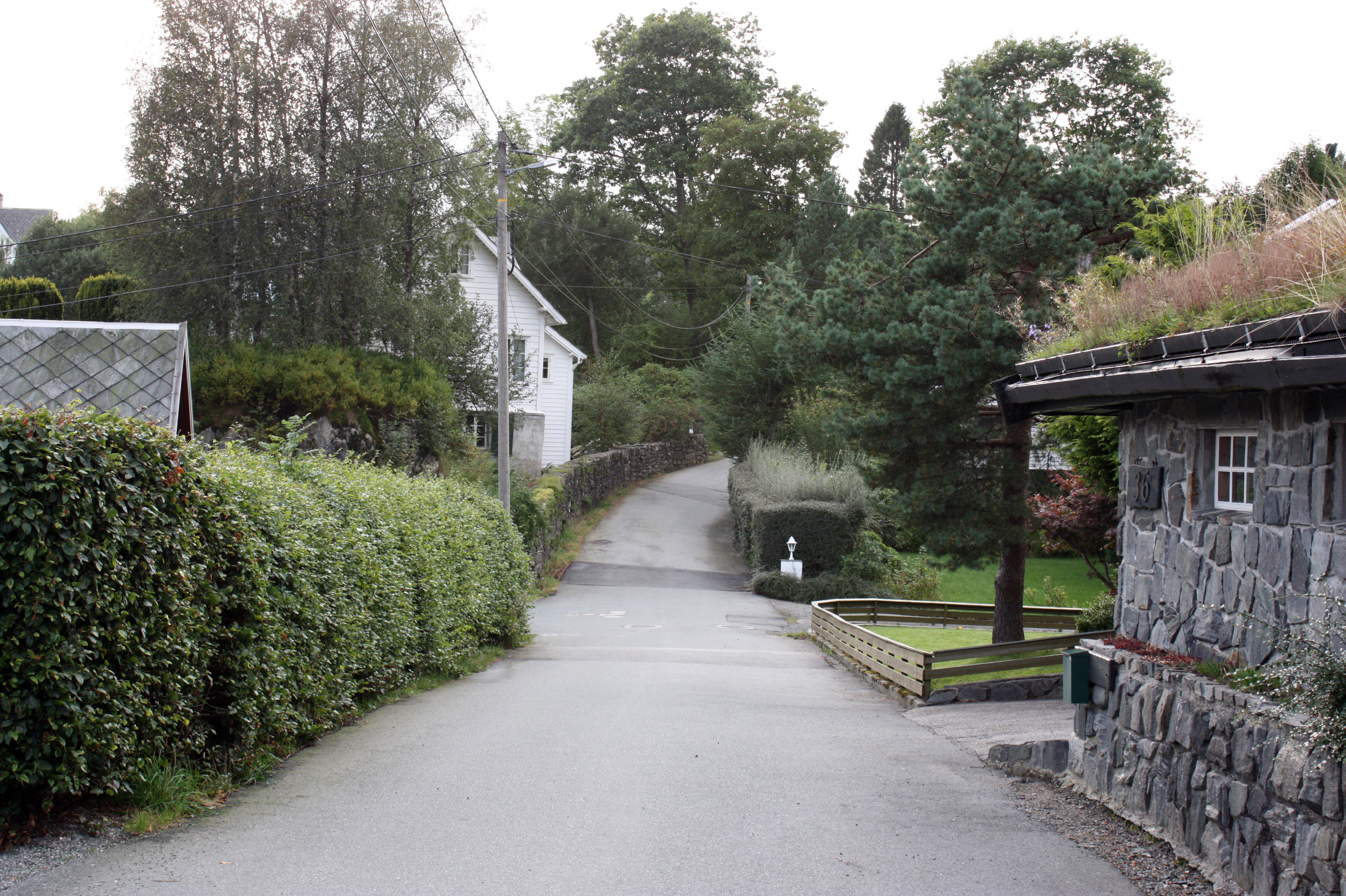 Tømmeråsen, Fana, Bergen.